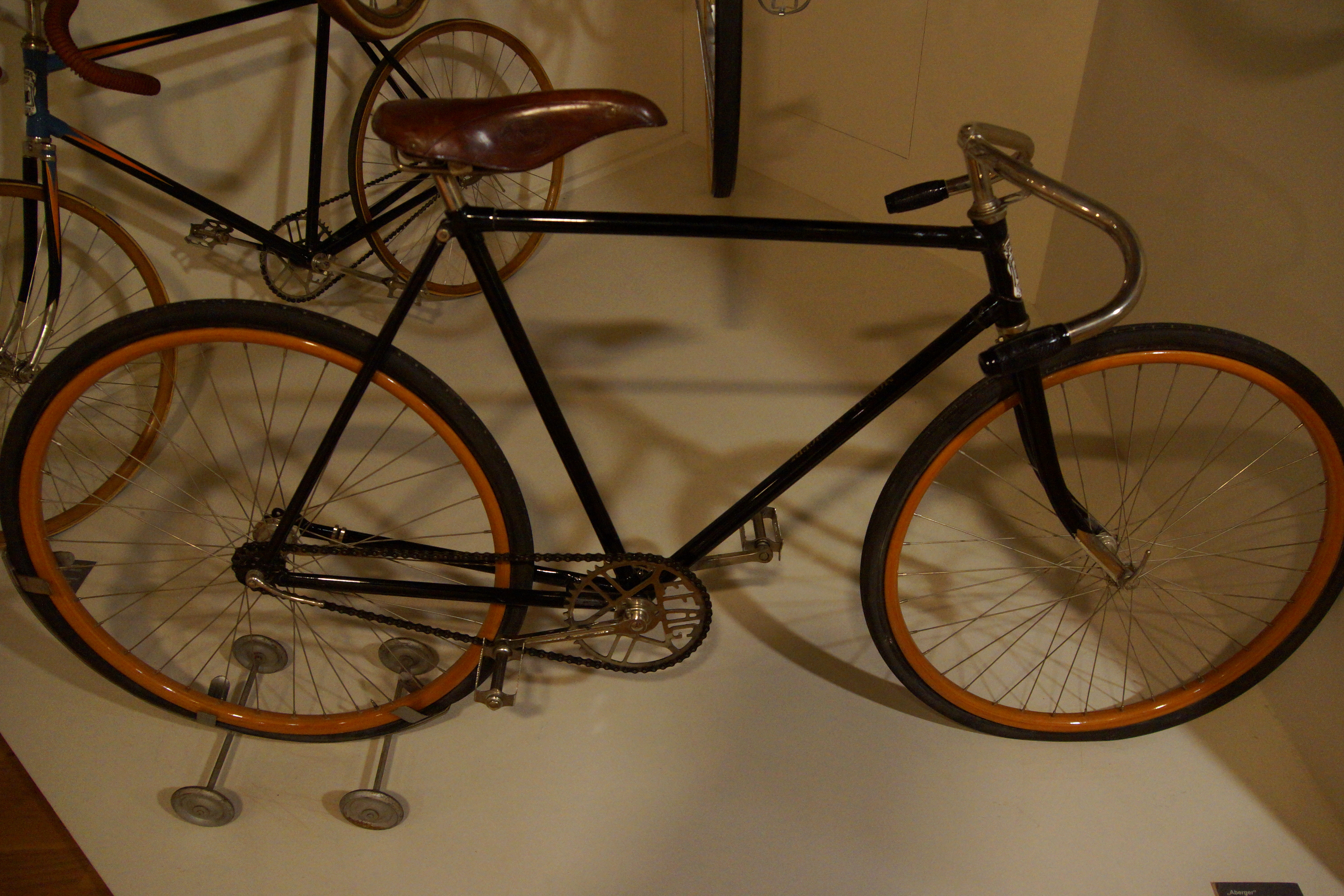 Stadtmuseum Neumarkt - Abteilung ehemalige Expresswerke